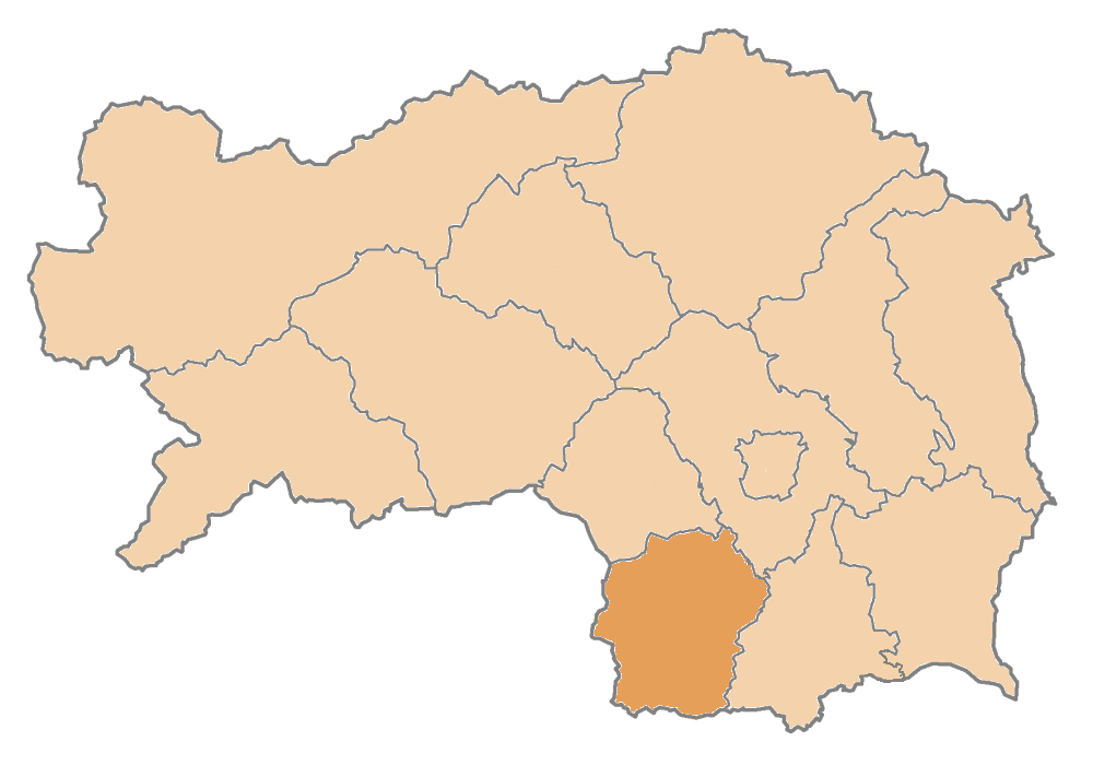 Karte: politischer Bezirk Deutschlandsberg Lizenz: GNU FDL Quelle: Zeichnung plp Datum: de:2004 Ort: Wien